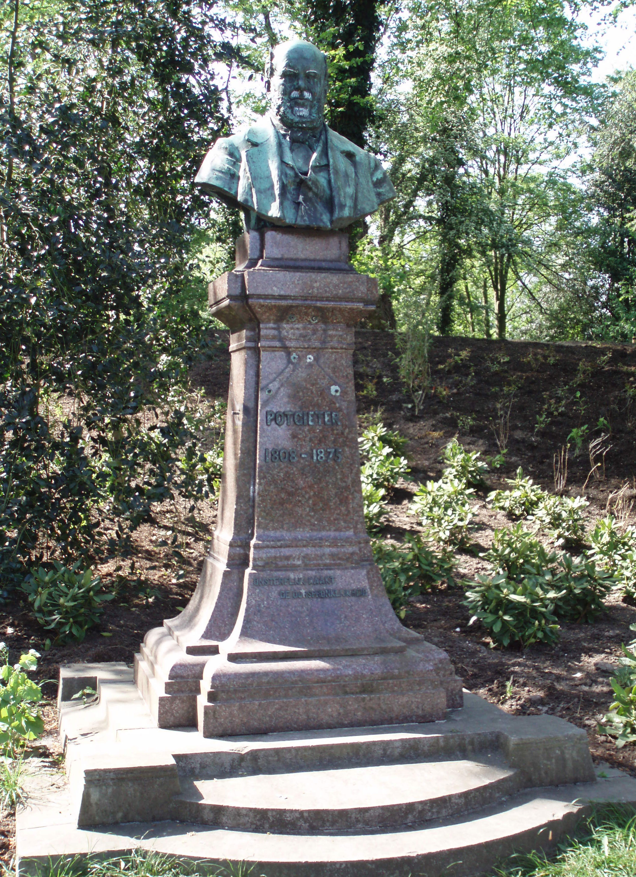 Standbeeld/buste (1908) van Everhardus Johannes Potgieter in Zwolle.